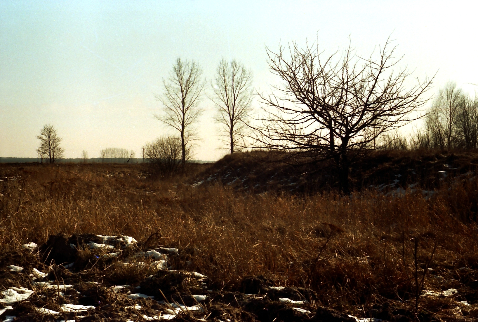 Zewnętrzne wały grodziska w roku 1993 (przed zniszczeniem).